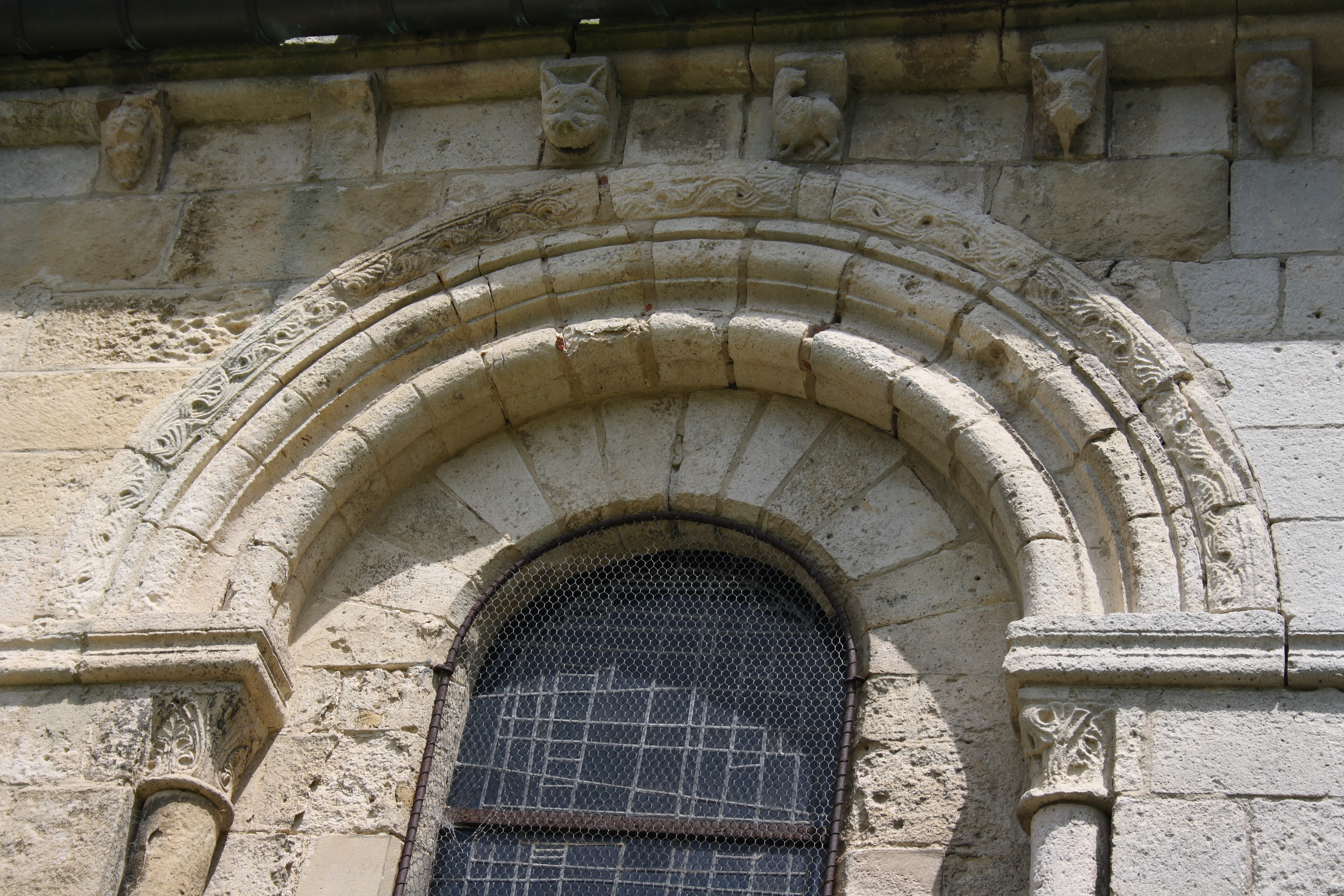 katholische Pfarrkirche Saint-Sulpice in Chars